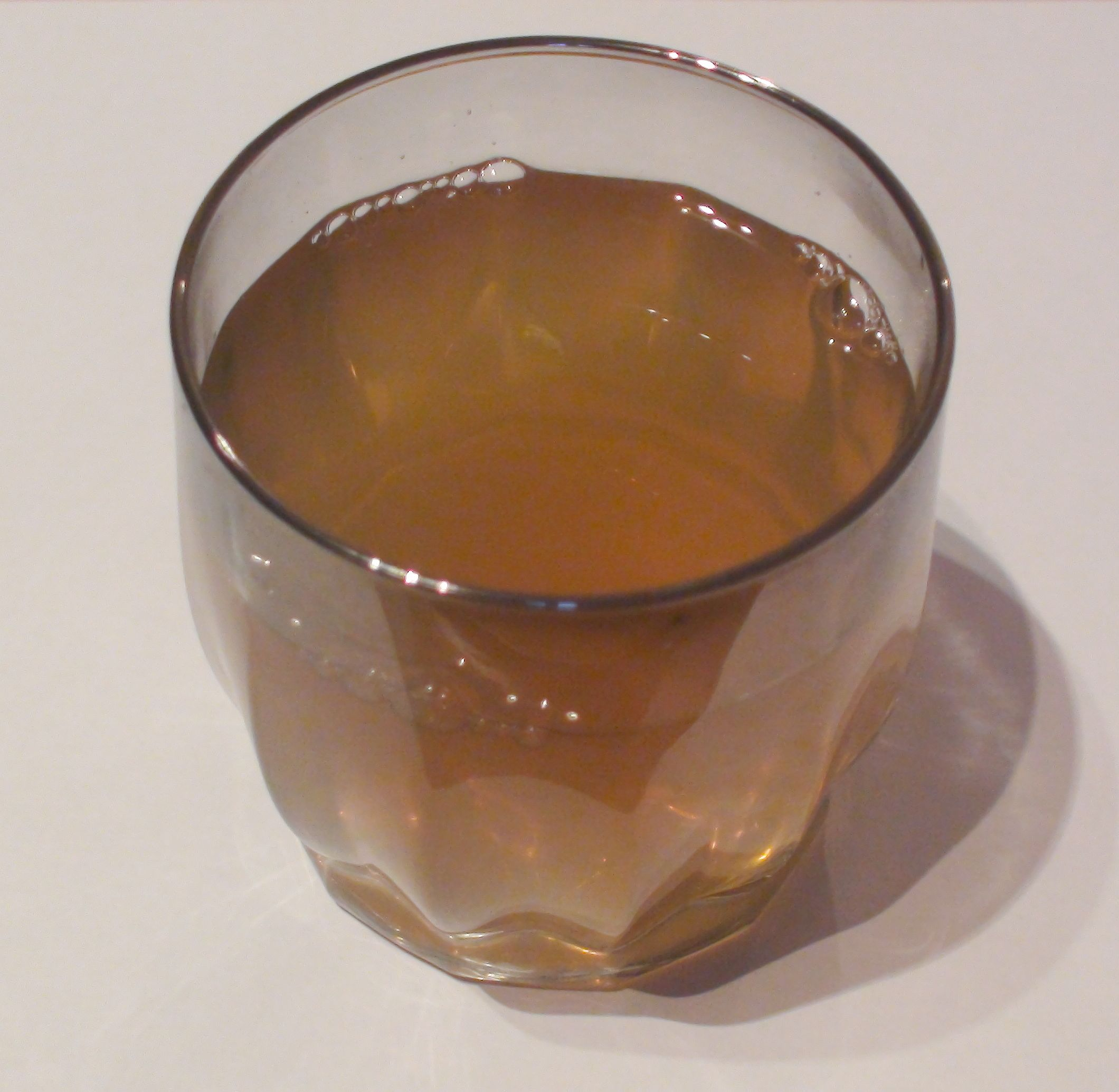 Напиток Бал